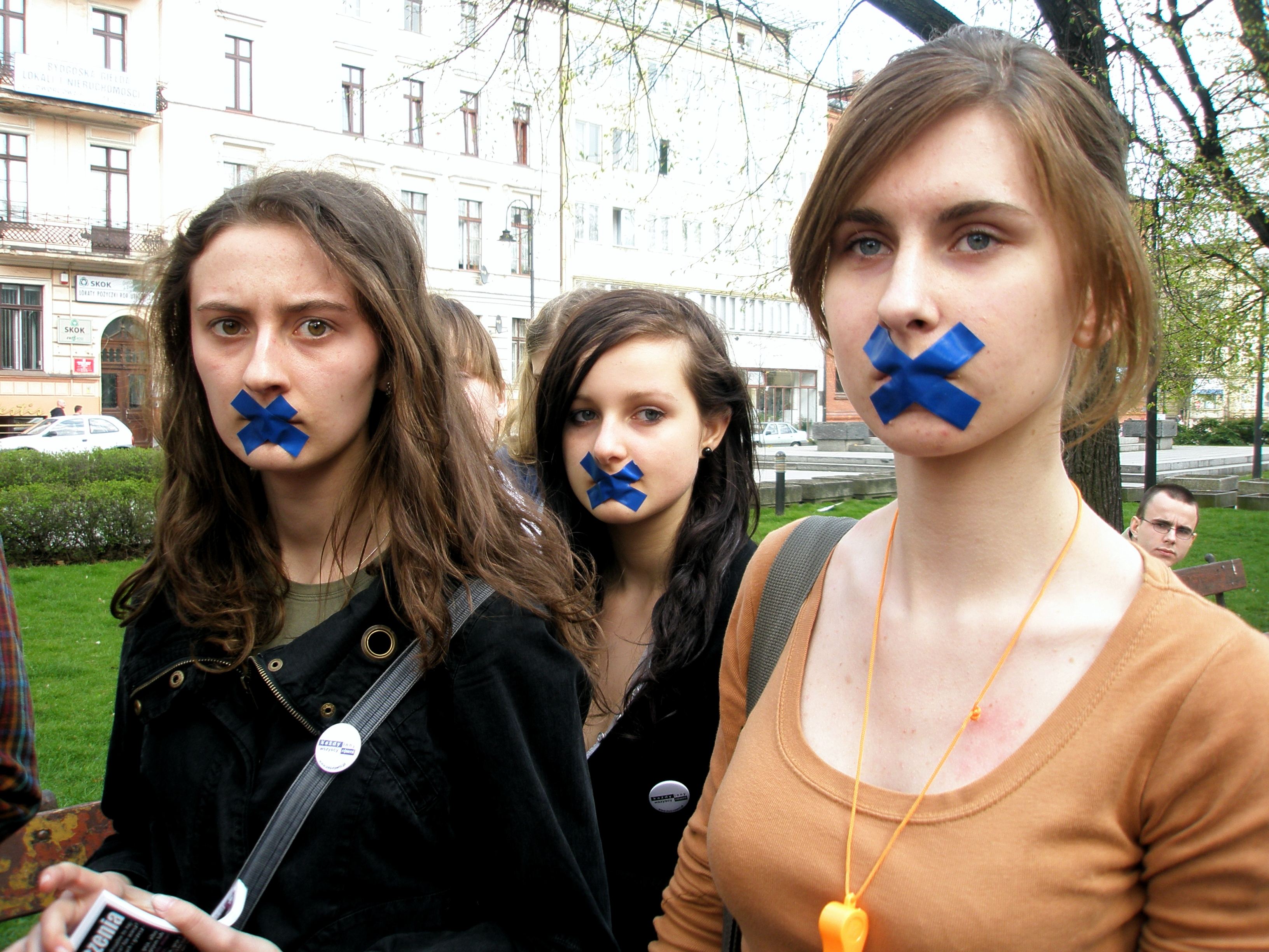 Tago de Silento 2008 en Bydgoszcz, Pollando.